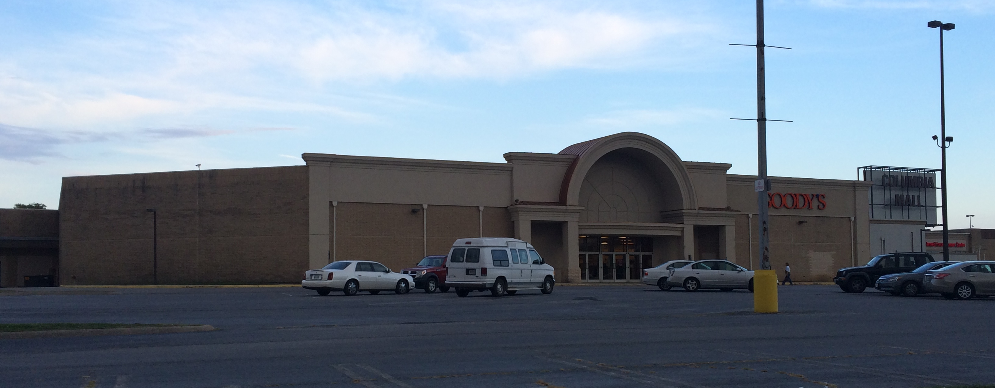 Columbia Mall Columbia, TN